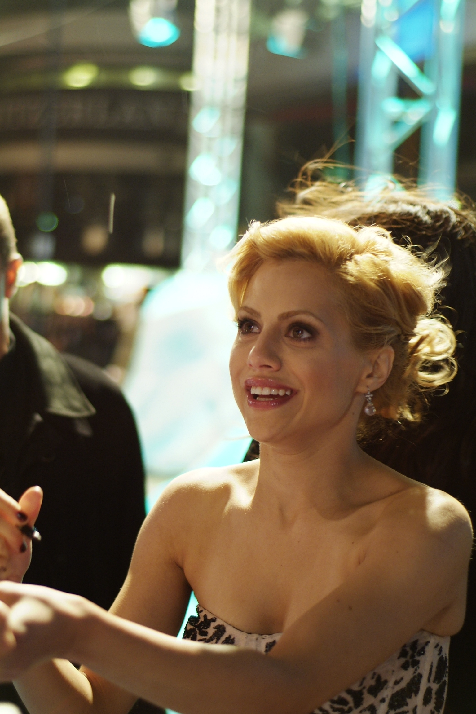 Happy Feet Premiere